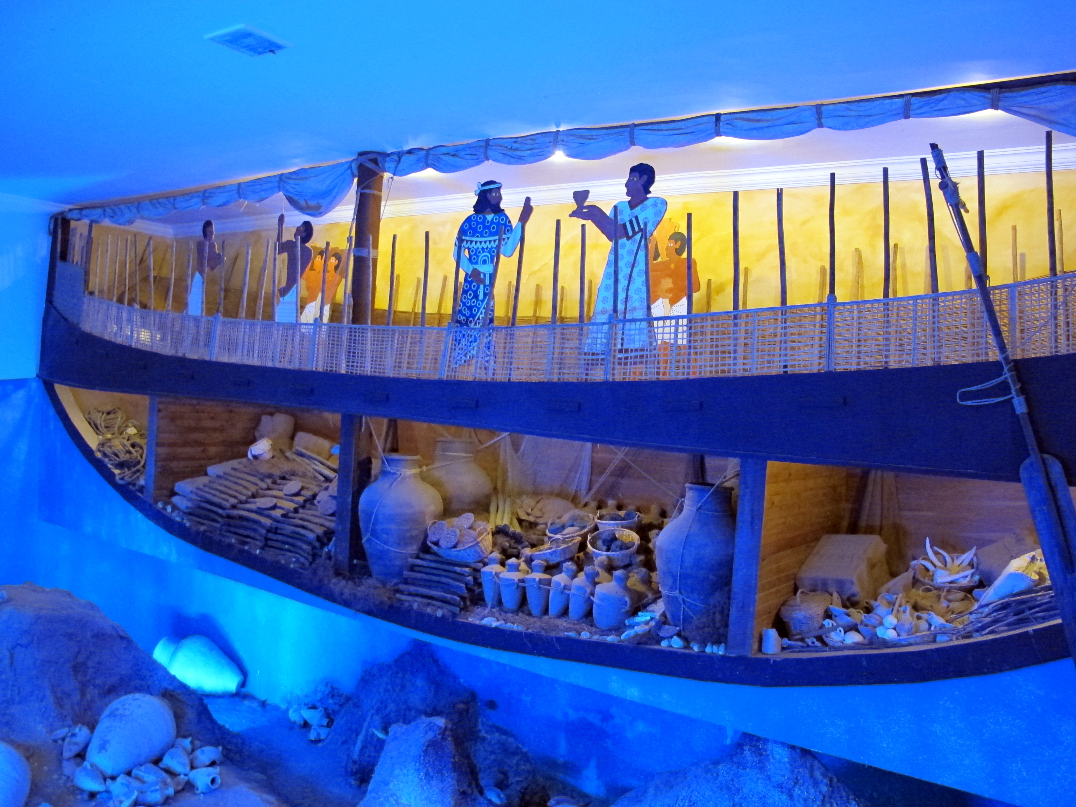 Castello di bodrum, ricostruzione di nave antica